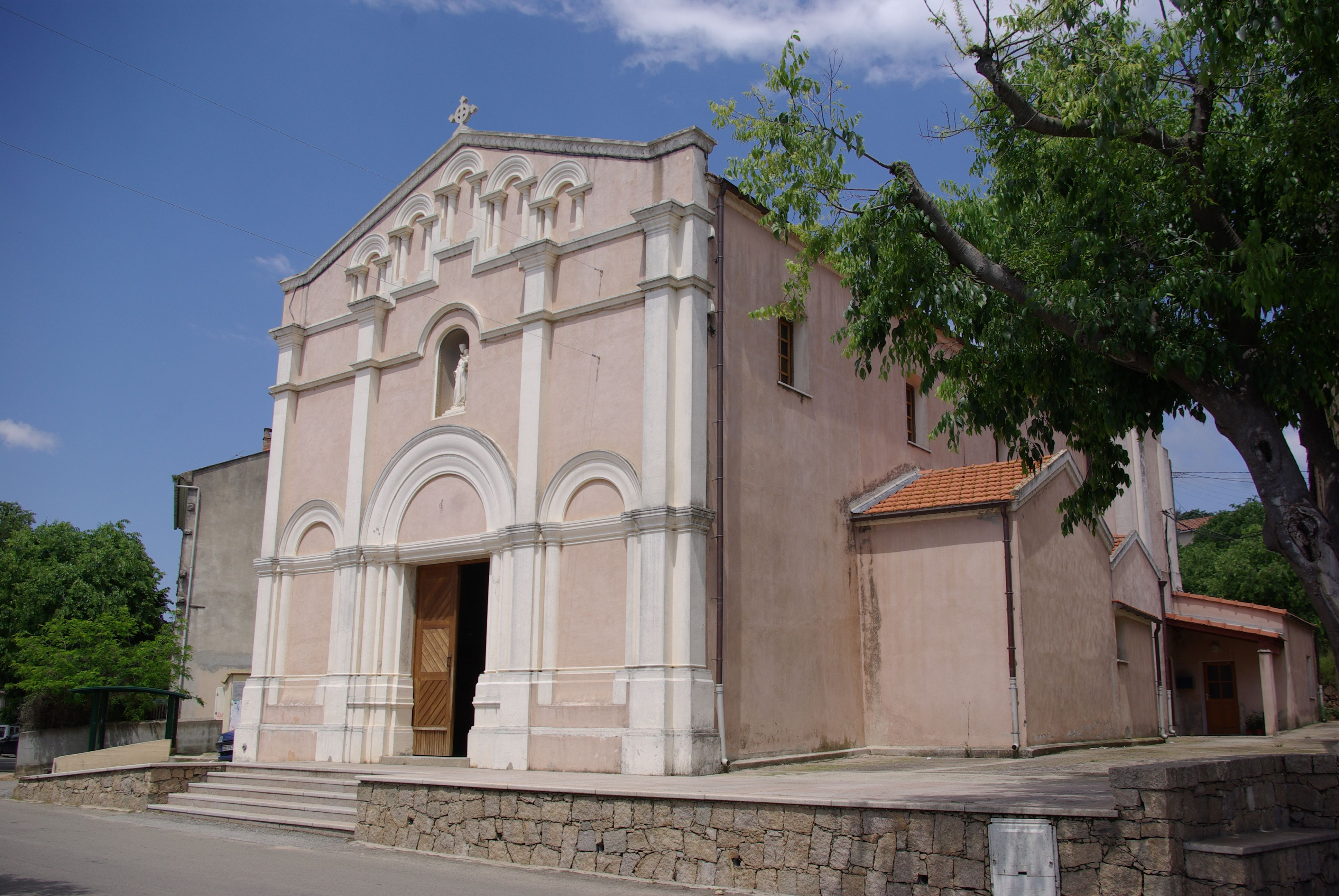 Afa auf Korsika in Frankreich. Die Kirche im Ortskern steht in der Nähe des Rathauses.